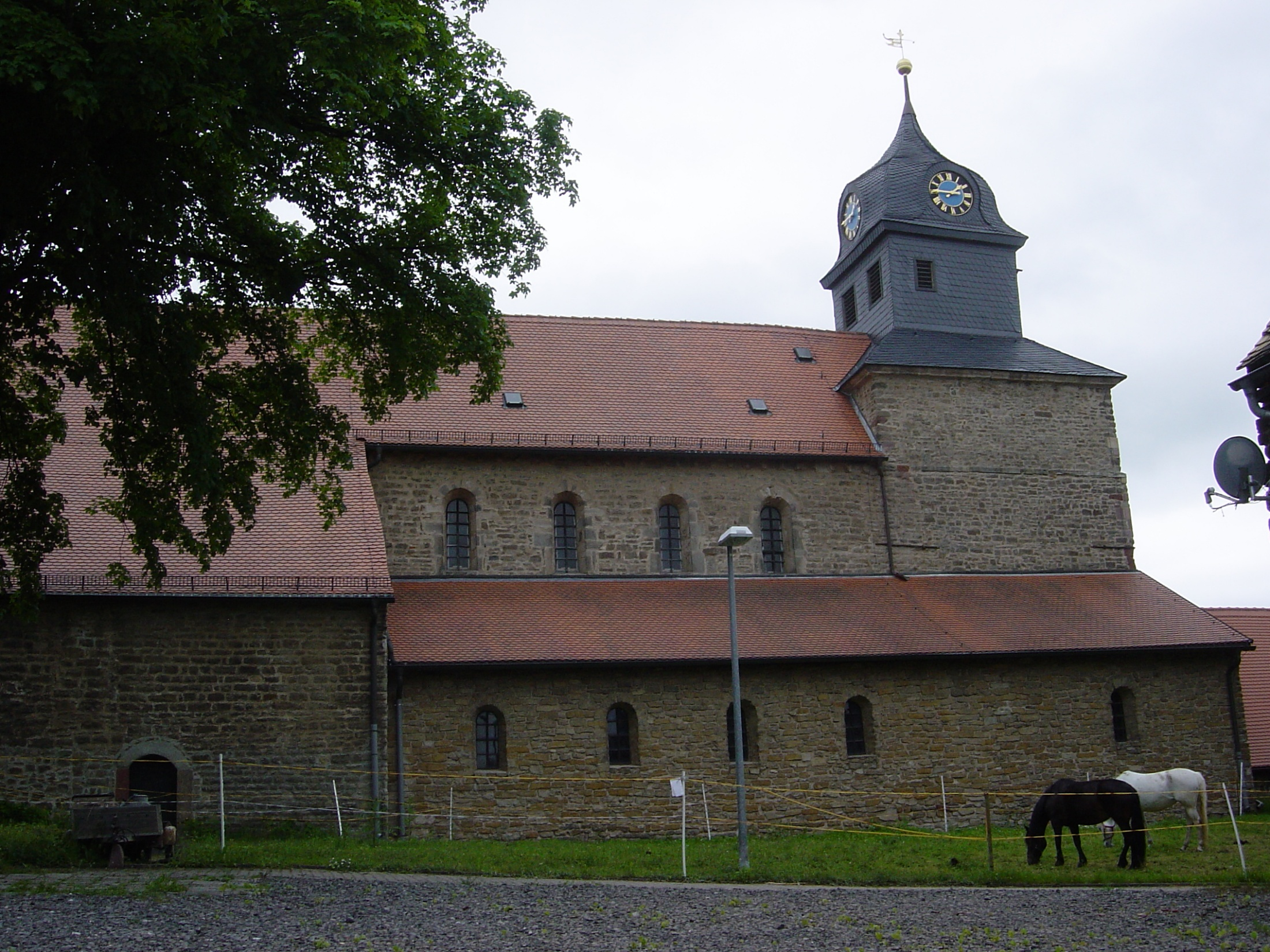 Evangelische Klosterkirche St. Marien, Kirchstraße 2, 06308 Klostermansfeld